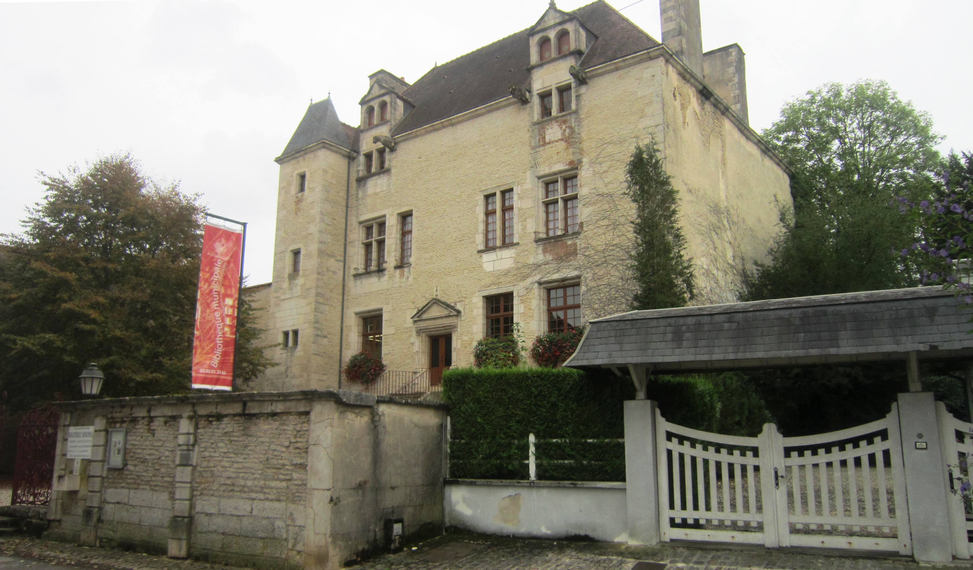 Bibliothèque municipale de Châtillon-sur-Seine